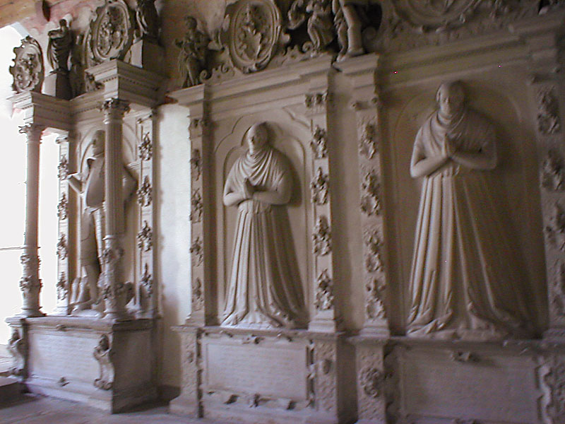 Epitaphe für Johann Philipp von Helmstatt und seine Frauen Agnes und Dorothea in der Totenkirche zu Neckarbischofsheim, von Jakob Müller (siehe Peter Beisel: Jakob Müller. Ein Bildhauer und Baumeister, der Neckarbischofsheim geprägt hat. In: Kraichgau. Beiträge zur Landschafts- und Heimatforschung, Folge 18/2003, S. 123−130, Hrsg. vom Heimatverein Kraichgau, Eppingen 2003, ISBN 3-921214-28-9)